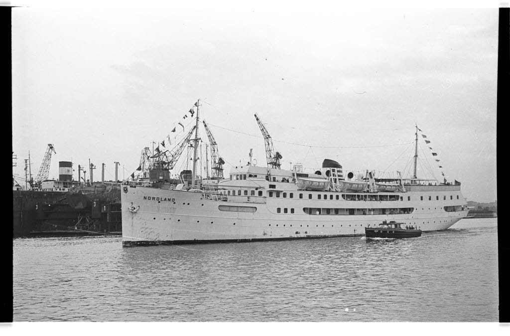 beim Auslaufen zur Fahrt für Leser und Freunde der Kieler Nachrichten (KN) nach Svendborg. Im Bild rechts das Polizeiboot WELS.